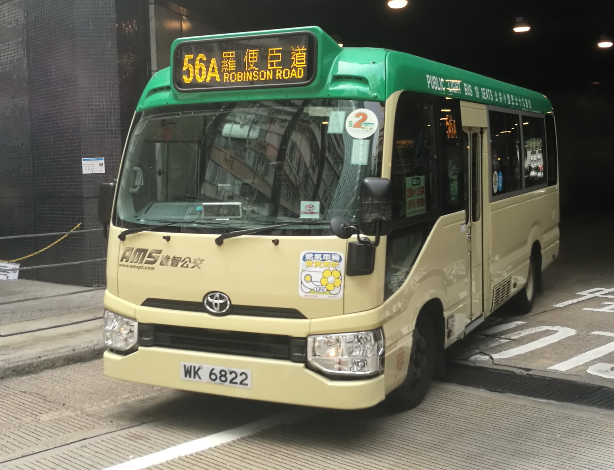 中文（中国大陆）: 小巴WK6822的照片